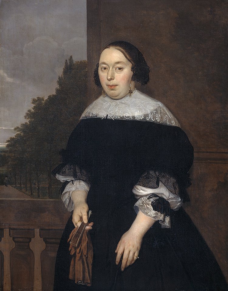 Pendant of File:Jan van Nes.jpg